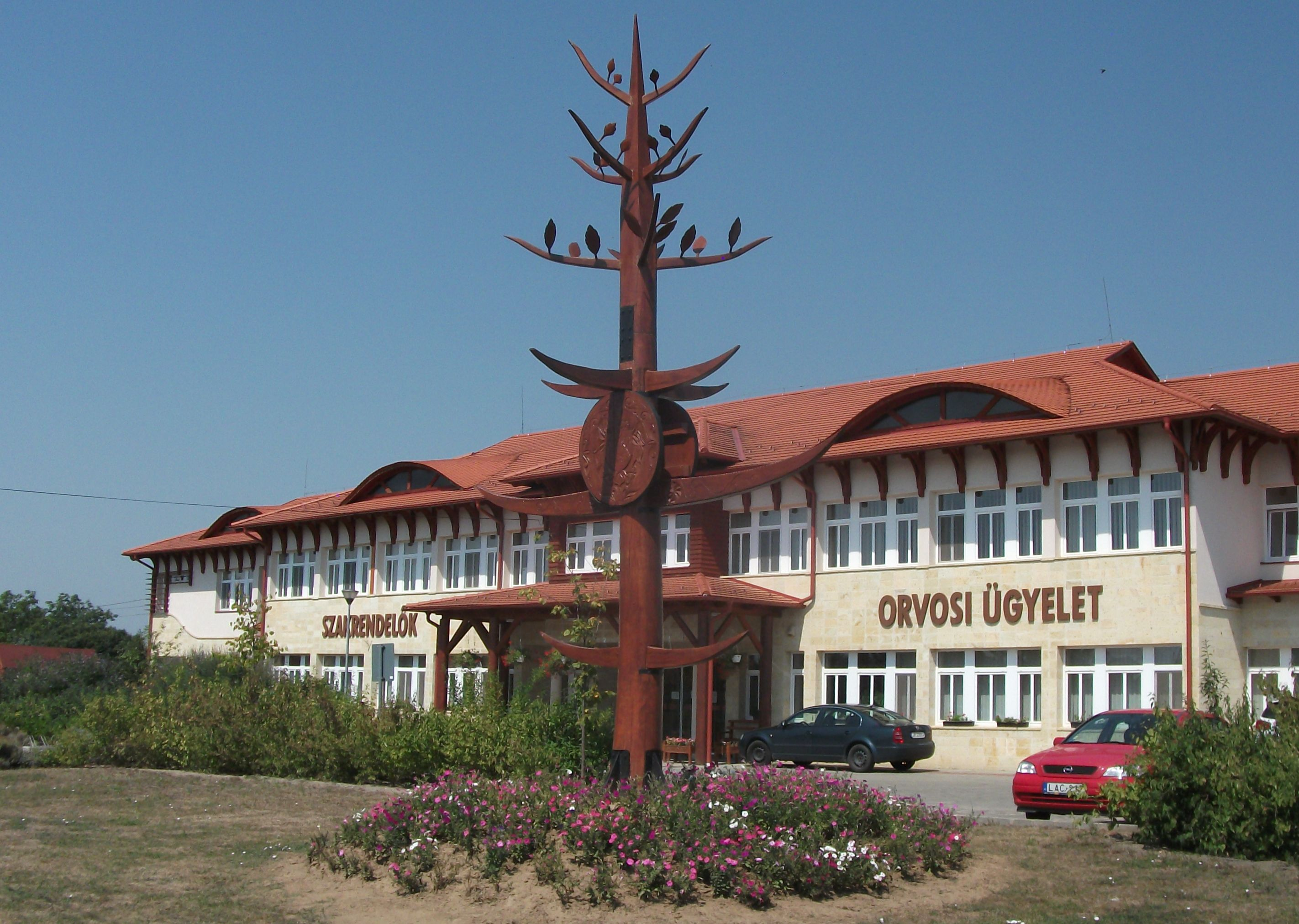 A Bodrogközi Kistérségi Járóbeteg Szakellátó Központ épülete Cigándon. A "Bodrogköz Egészségcentruma" . Az egészségcentrum 2012-ben kezdte meg működését, amely a helyi lakosság részére, illetve térségi szinten is biztosítja a szakrendeléseket. A kép előterében Varga András szobrászművész 2014-ben készült "Életfa" című alkotása látható.